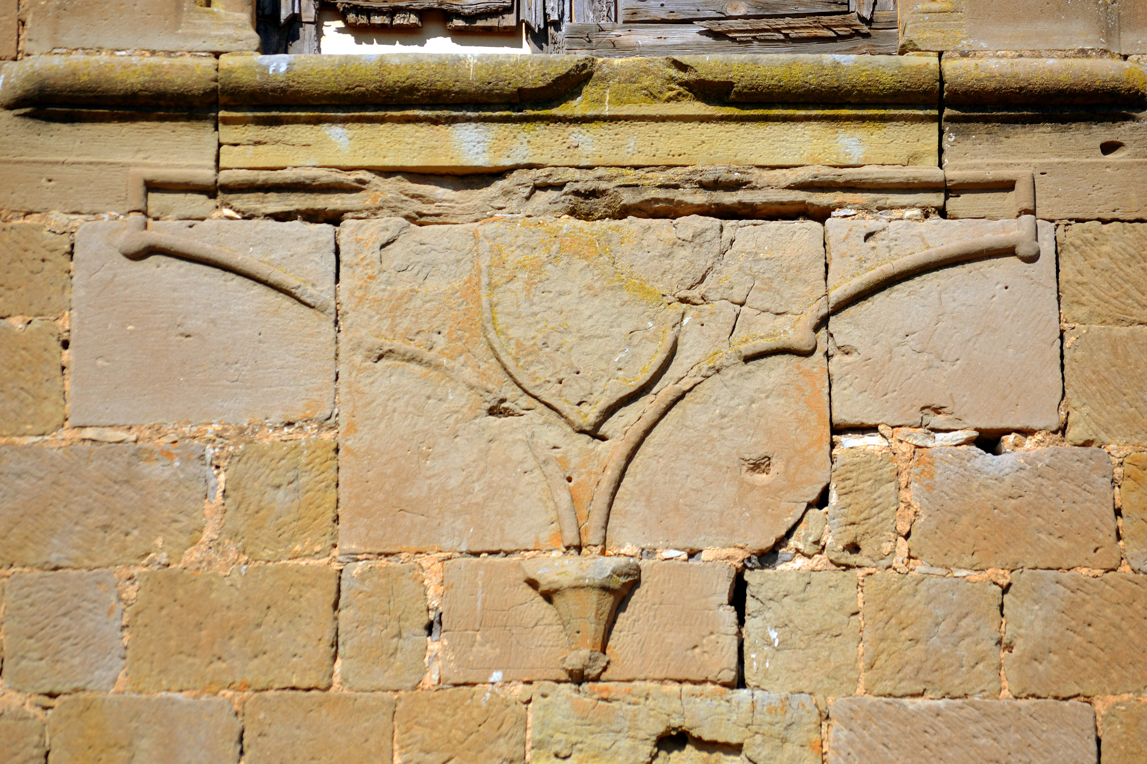 Castell de Montcortès (els Plans de Sió)